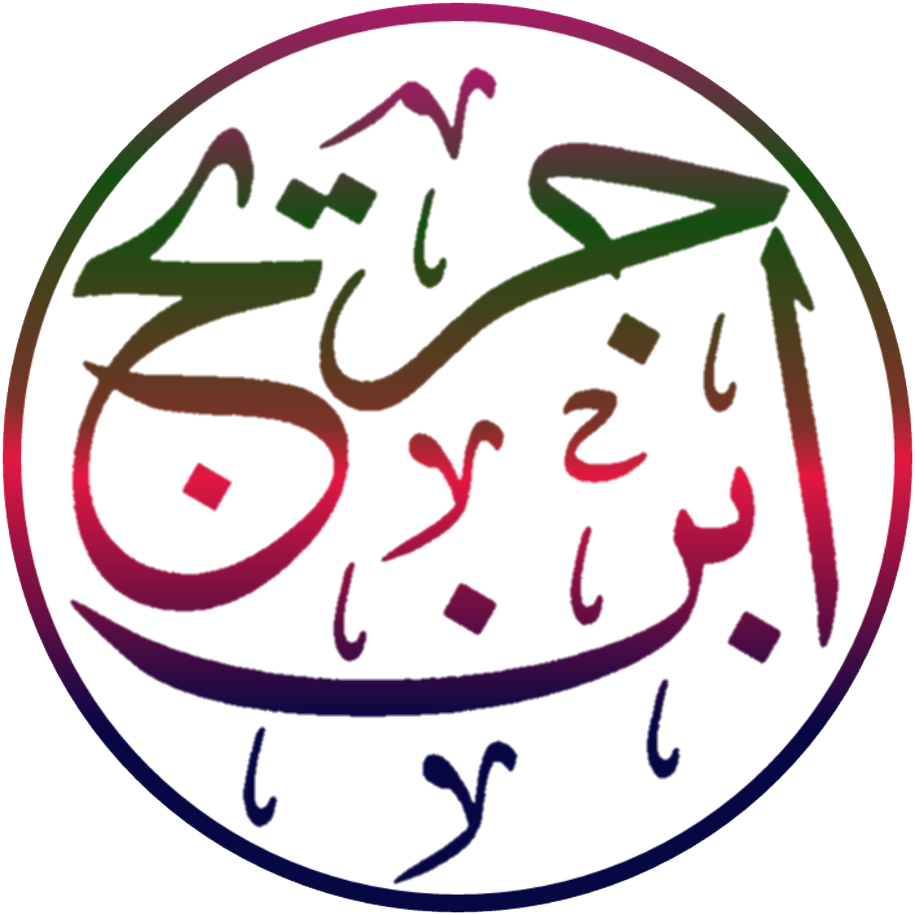 ابن جریج